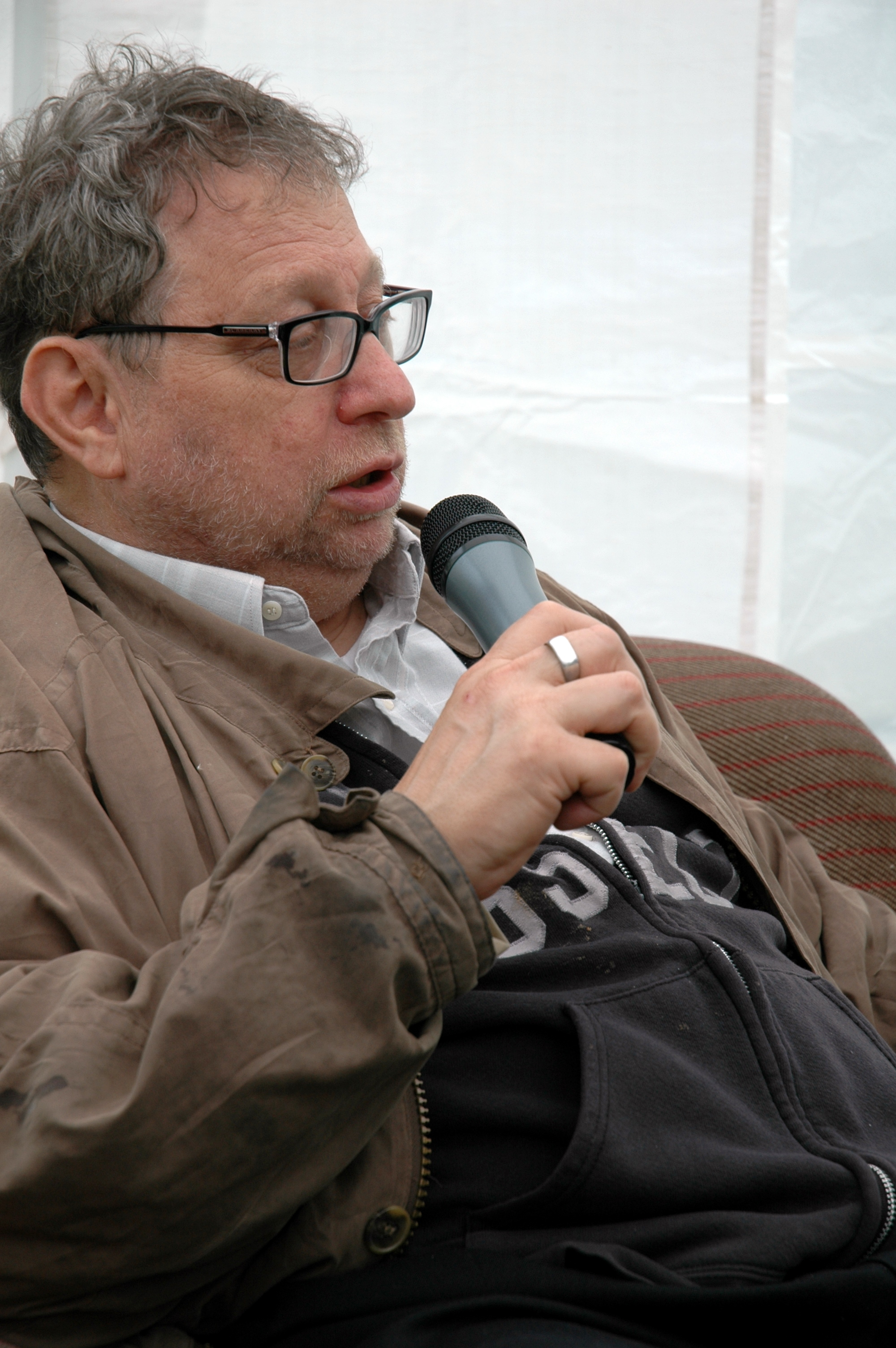 Danny Schechter ( at hsf ISWIradio, Ilmenau, Germany, 04. June 2007